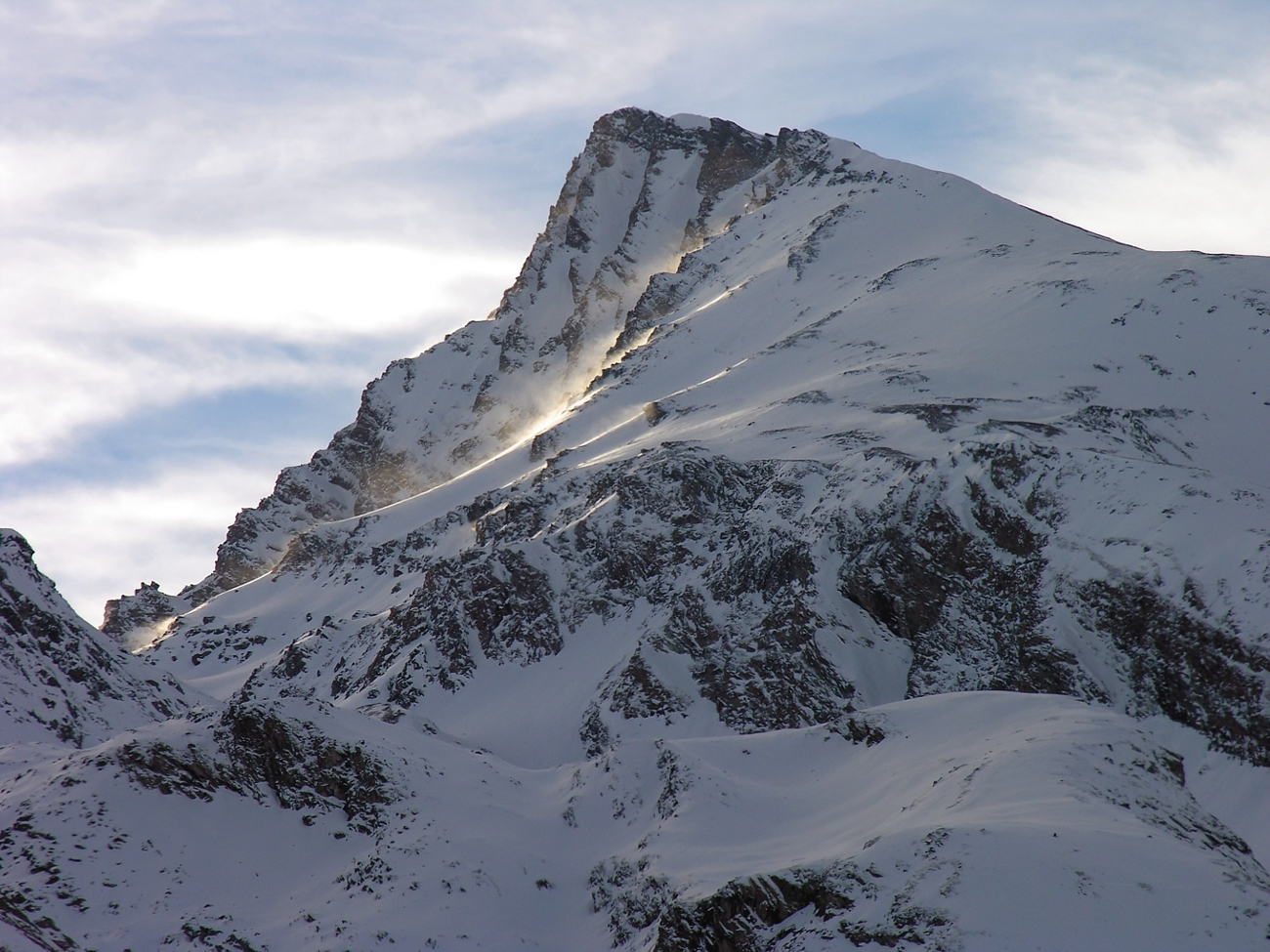 Monti la punta Rossa della Grivola Cogne (30-12-2004) - Alpi Graie - Italia